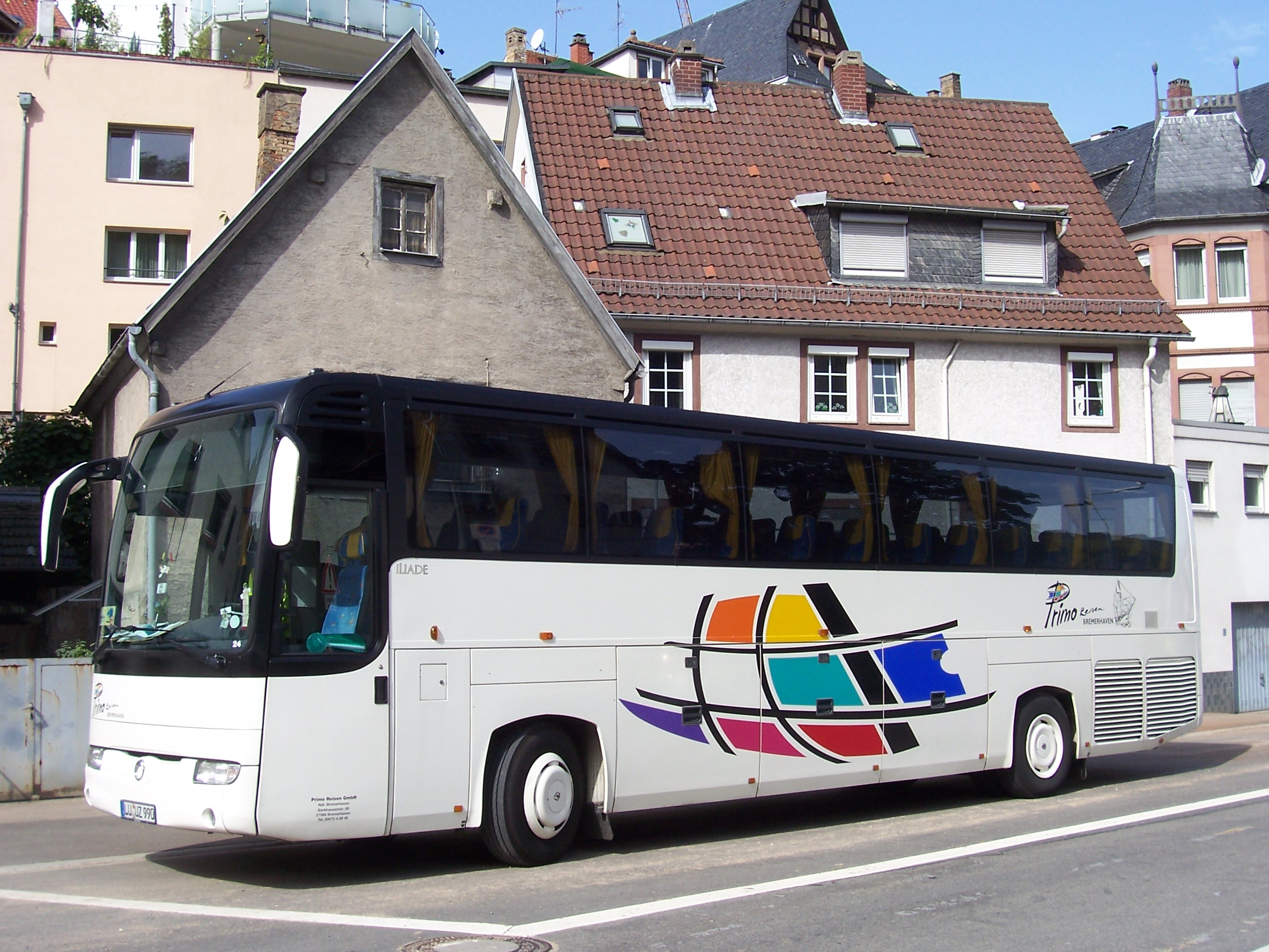 Ein Irisbus/Renault Iliade Reisebus in Weinheim an der Bergstraße